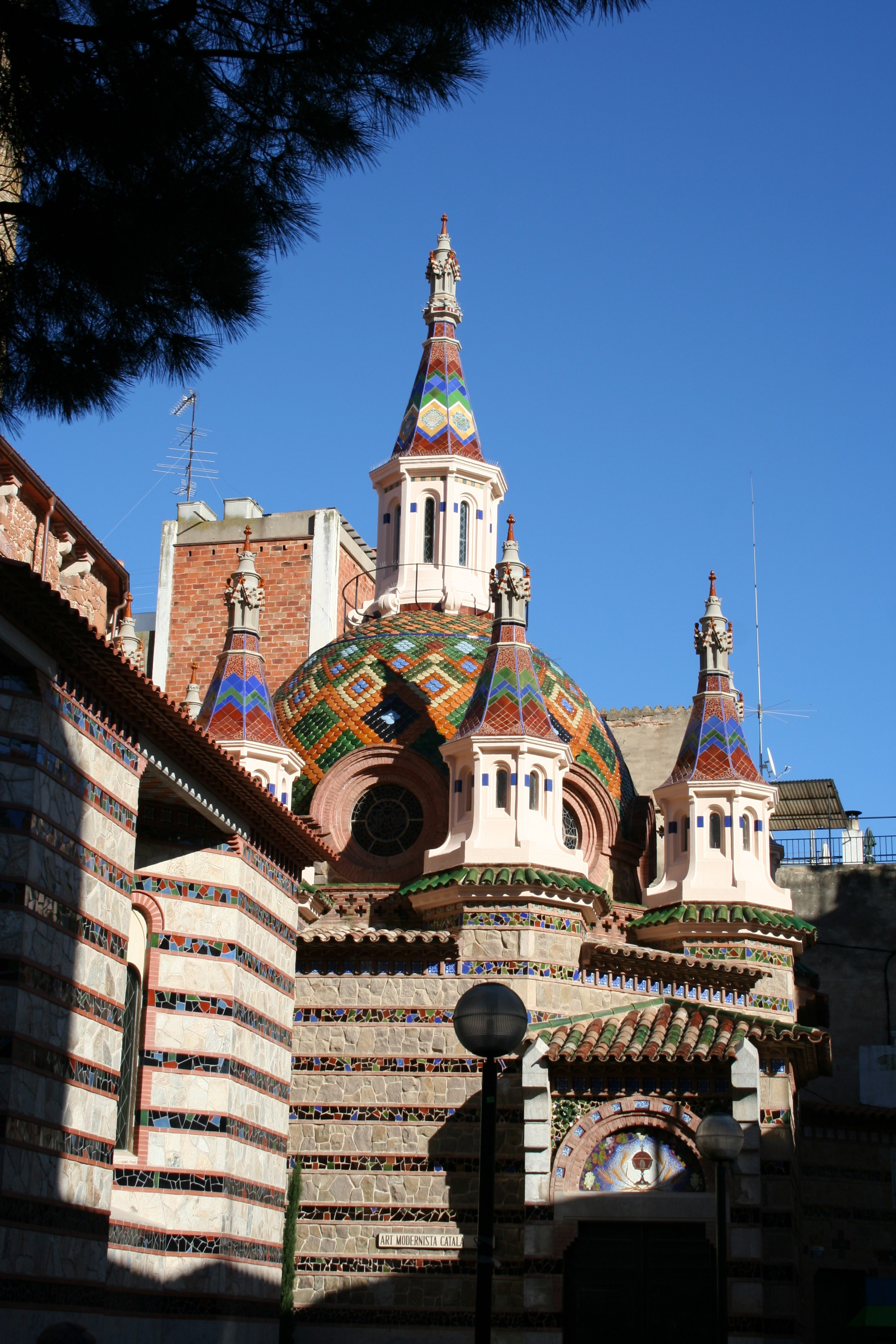 Iglesia pintoresca